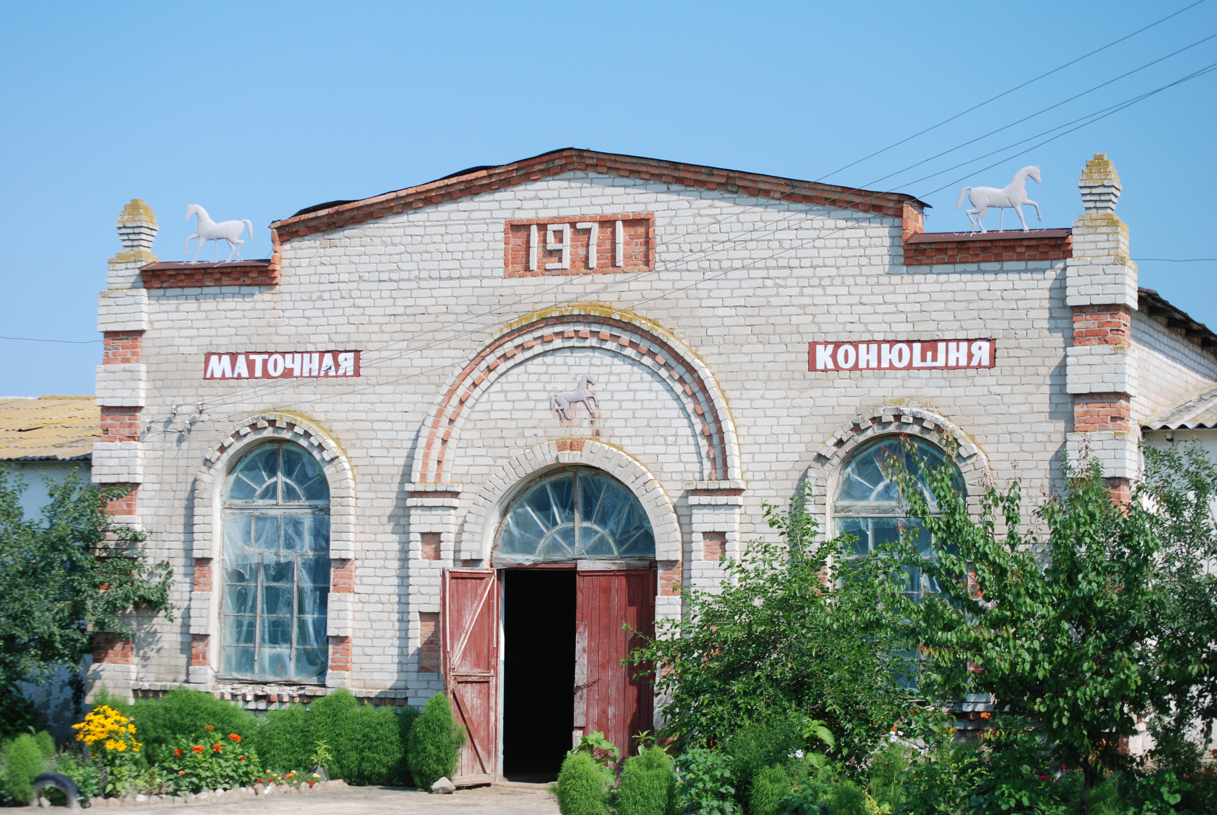 Комплекс споруд Деркульського кінного заводу, який відвідав радянський воєнний та державний діяч С. М. Будьонний, Данилівка